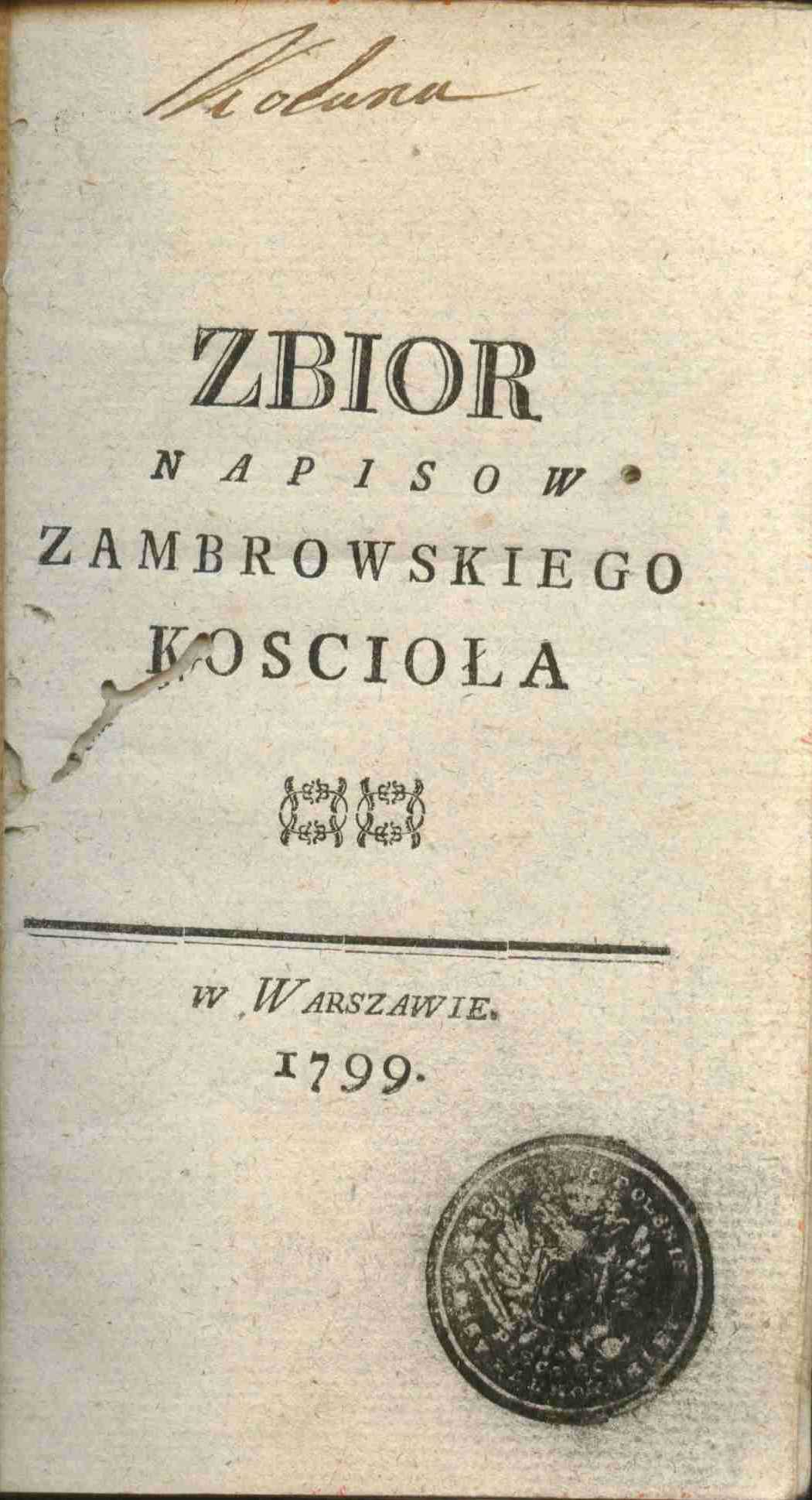 Napisy